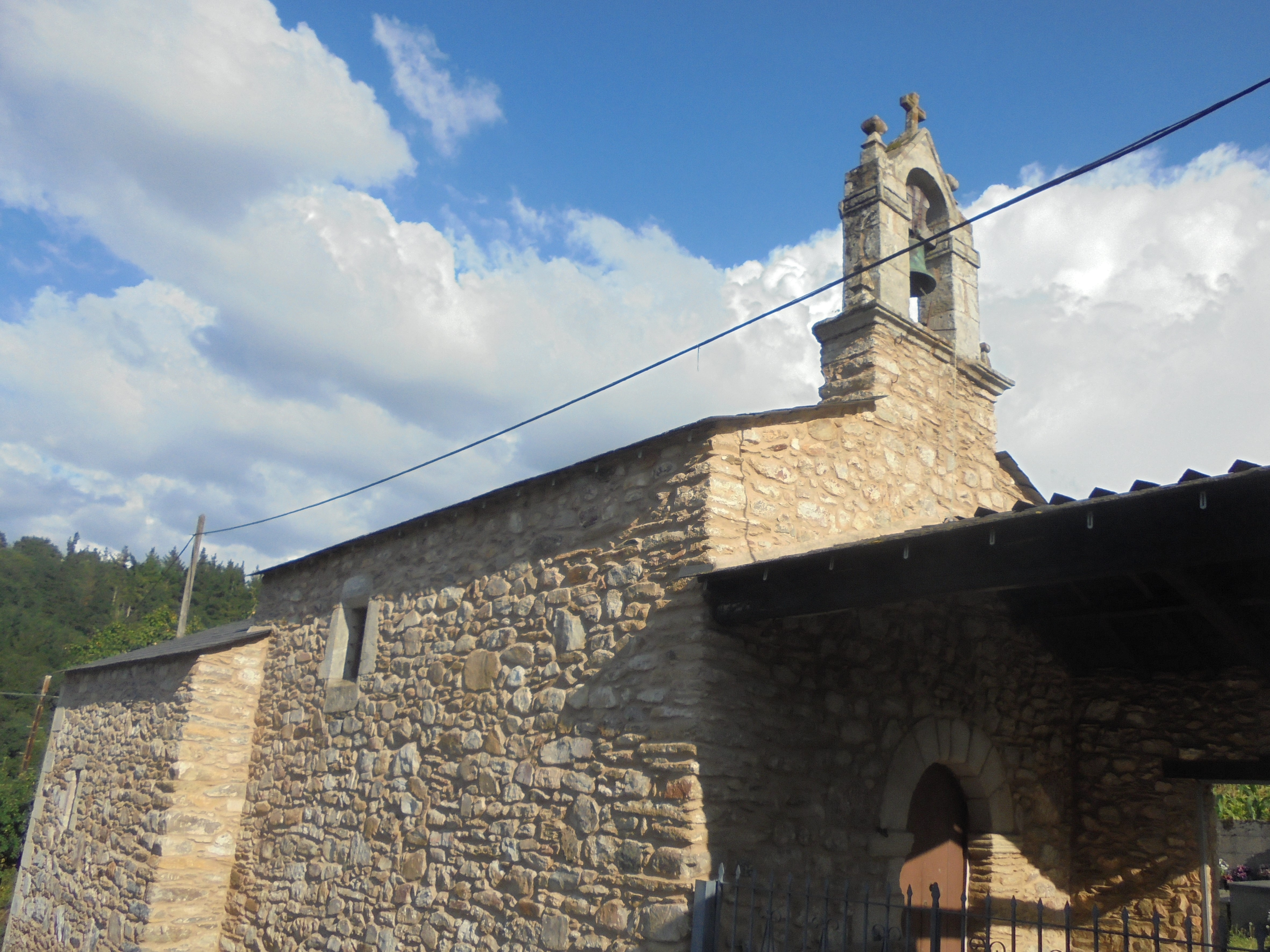 Igrexa parroquial de Santa María de Pol